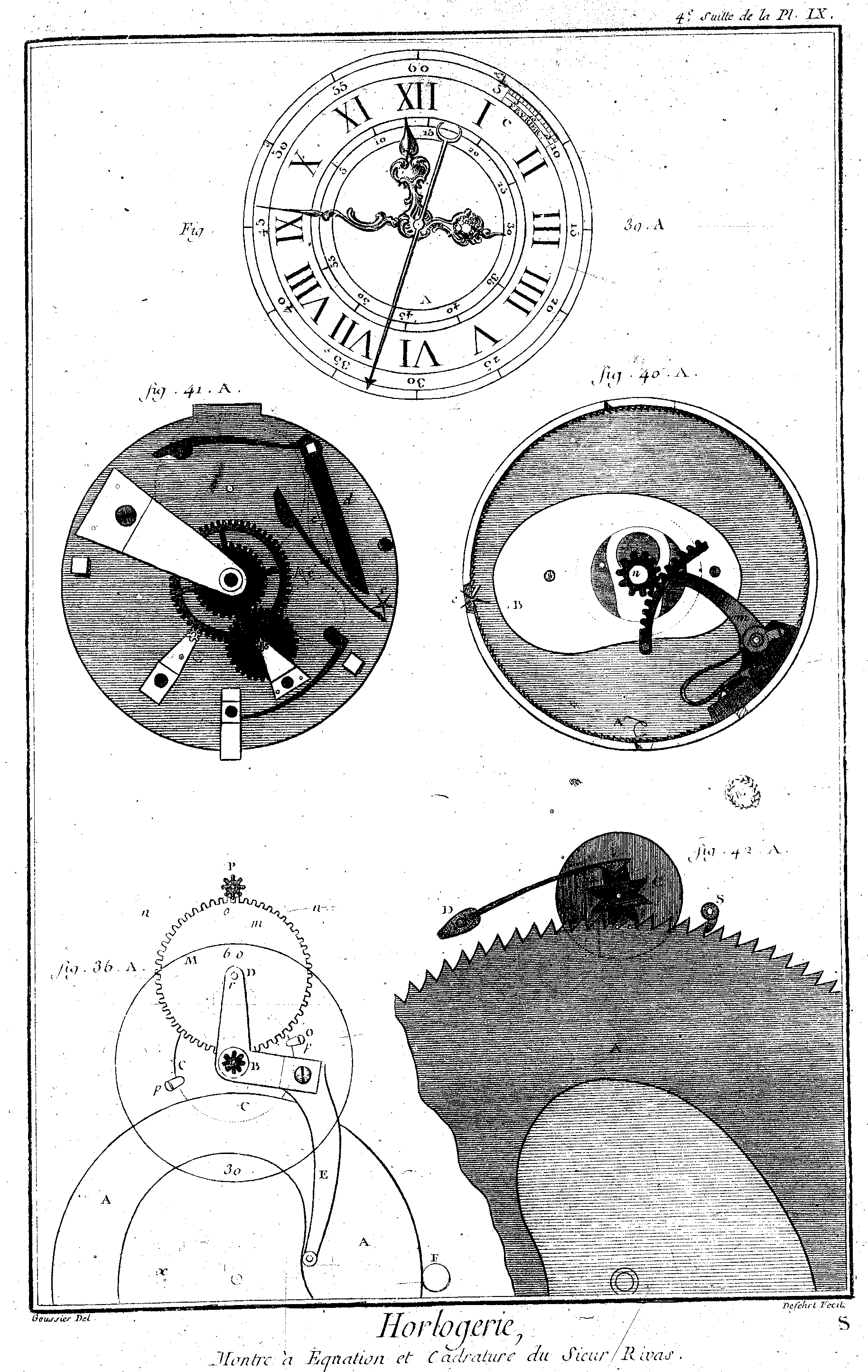 Planches de l'Encyclopédie de Diderot et d'Alembert, volume 3